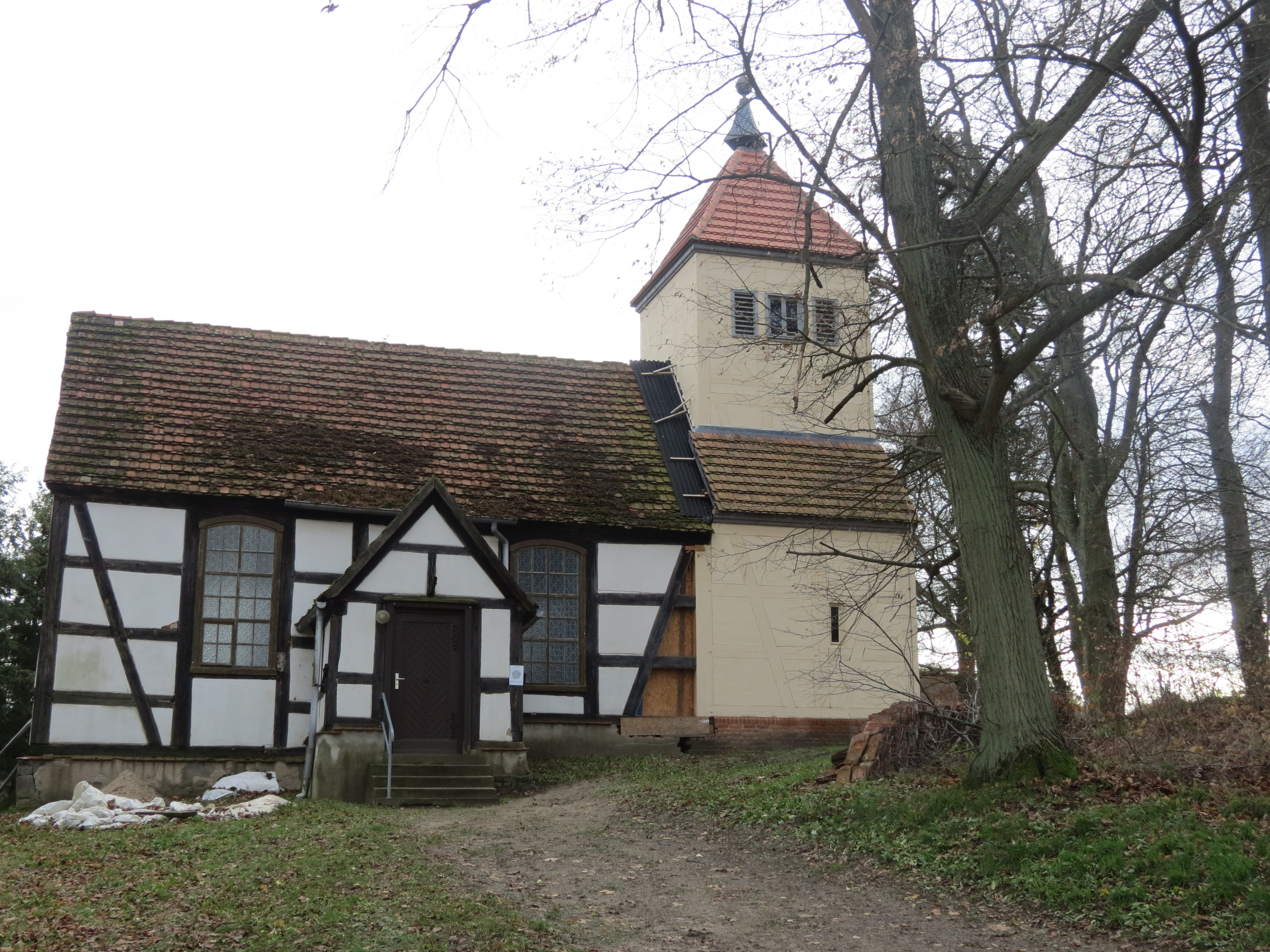 Dorfkirche Neu-Temmen, Westseite, während der Renovierung im November 2019, Neu-Temmen, Gem. Temmen-Ringenwalde, Lkr. Uckermark, Brandenburg